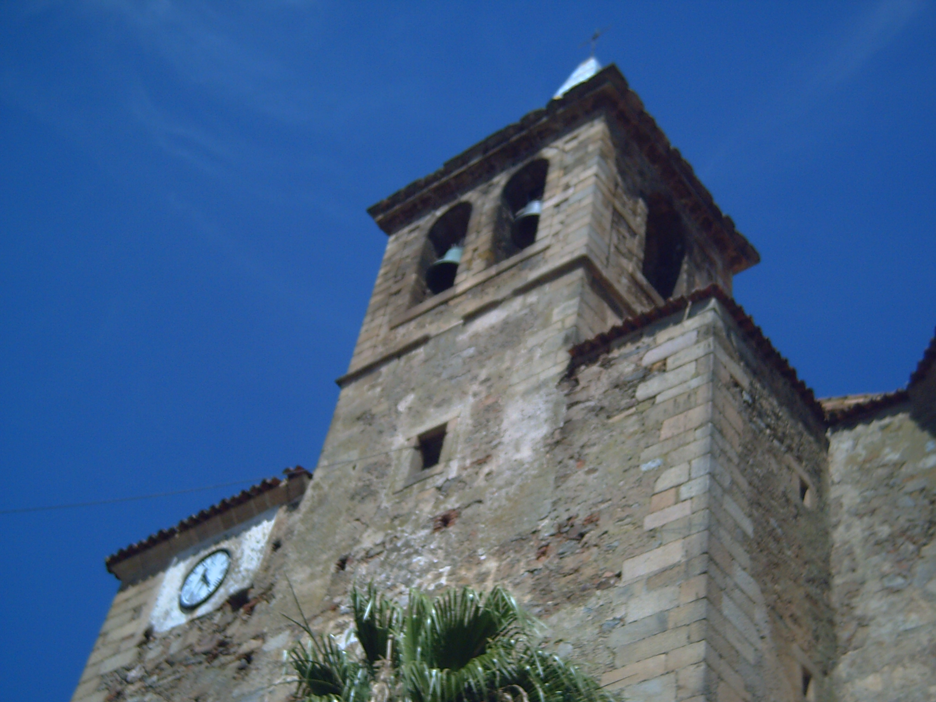 Elésia la puebración pacensi e Valverdi e Méria.